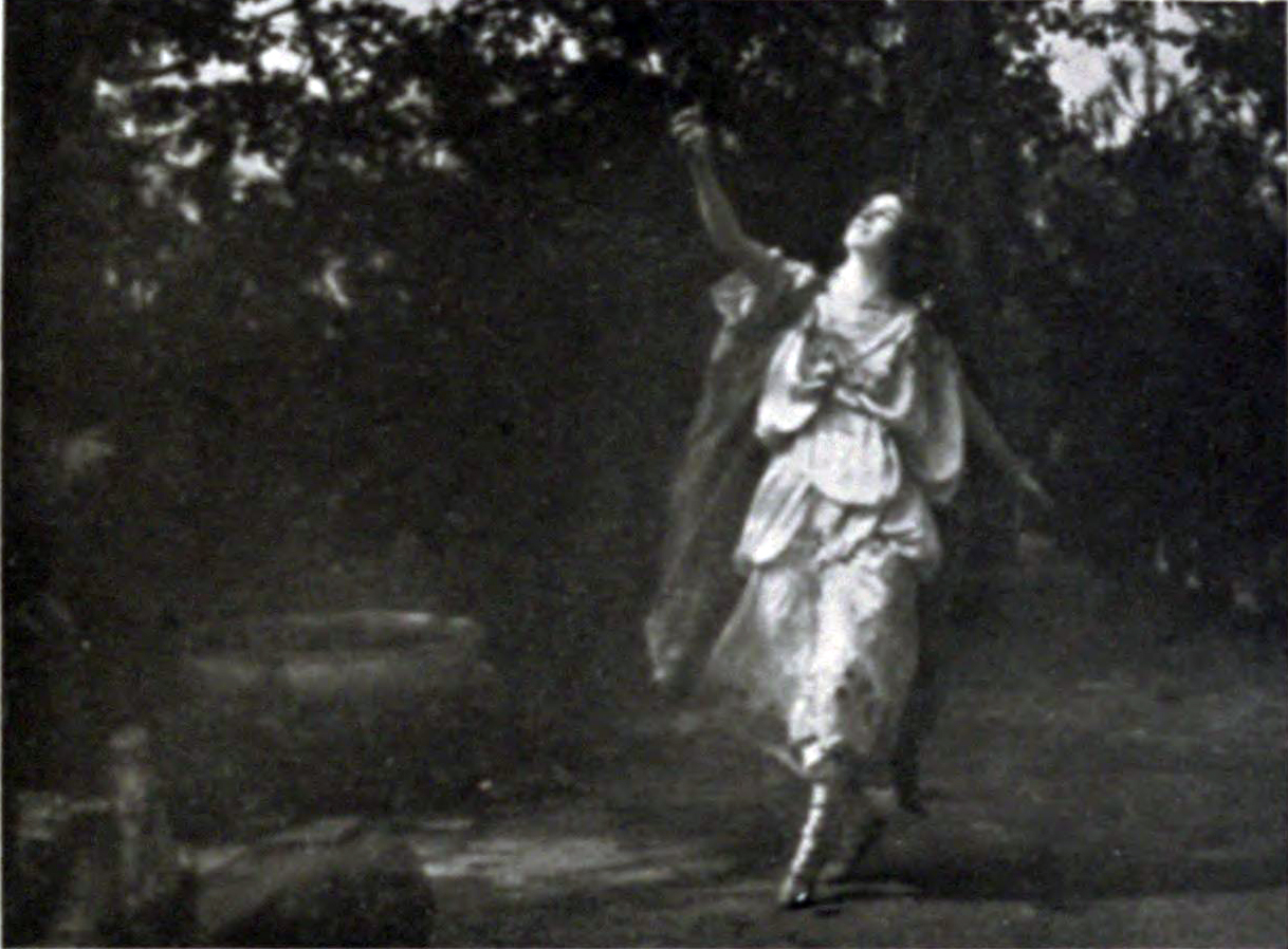 dancer Juliet Barrett Rublee